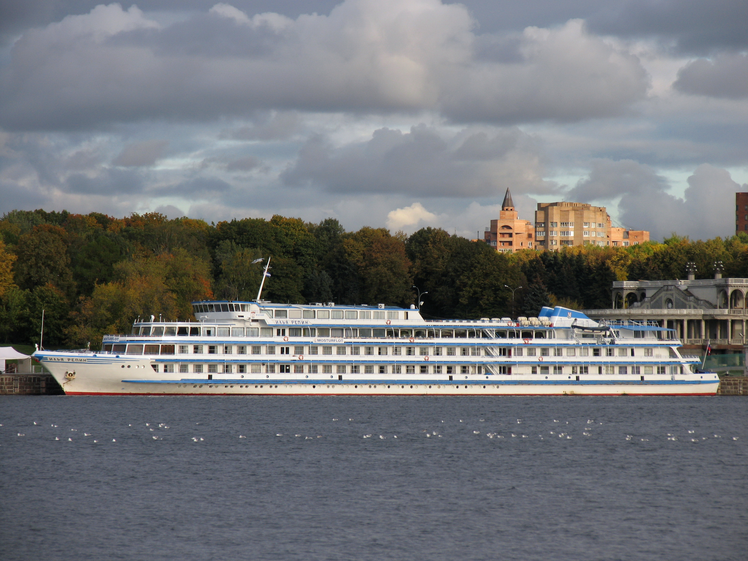 Речное круизное судно "Илья Репин" в Северном речном порту. Москва.